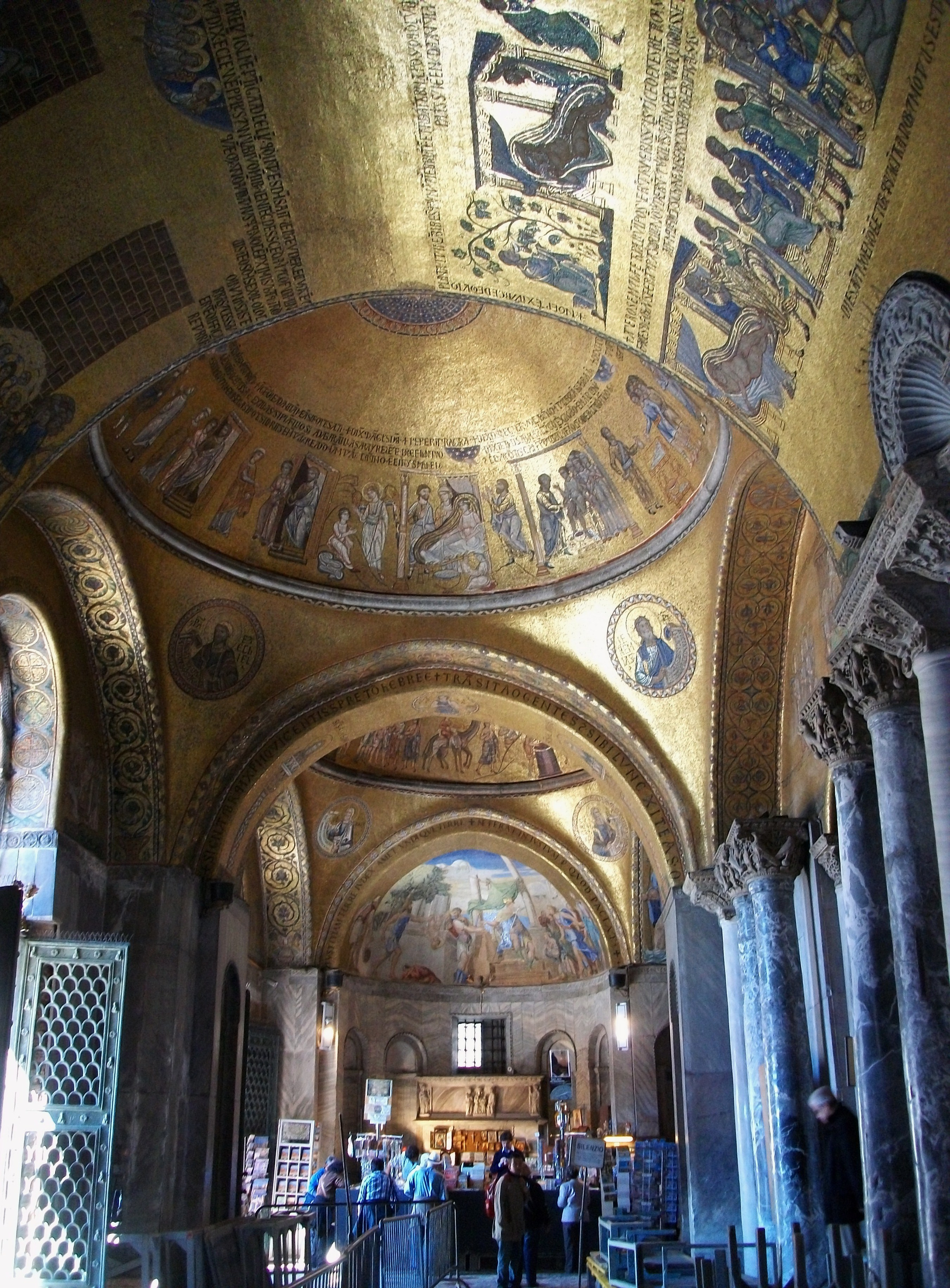 Nàrtex de la basílica de sant Marc de Venècia.